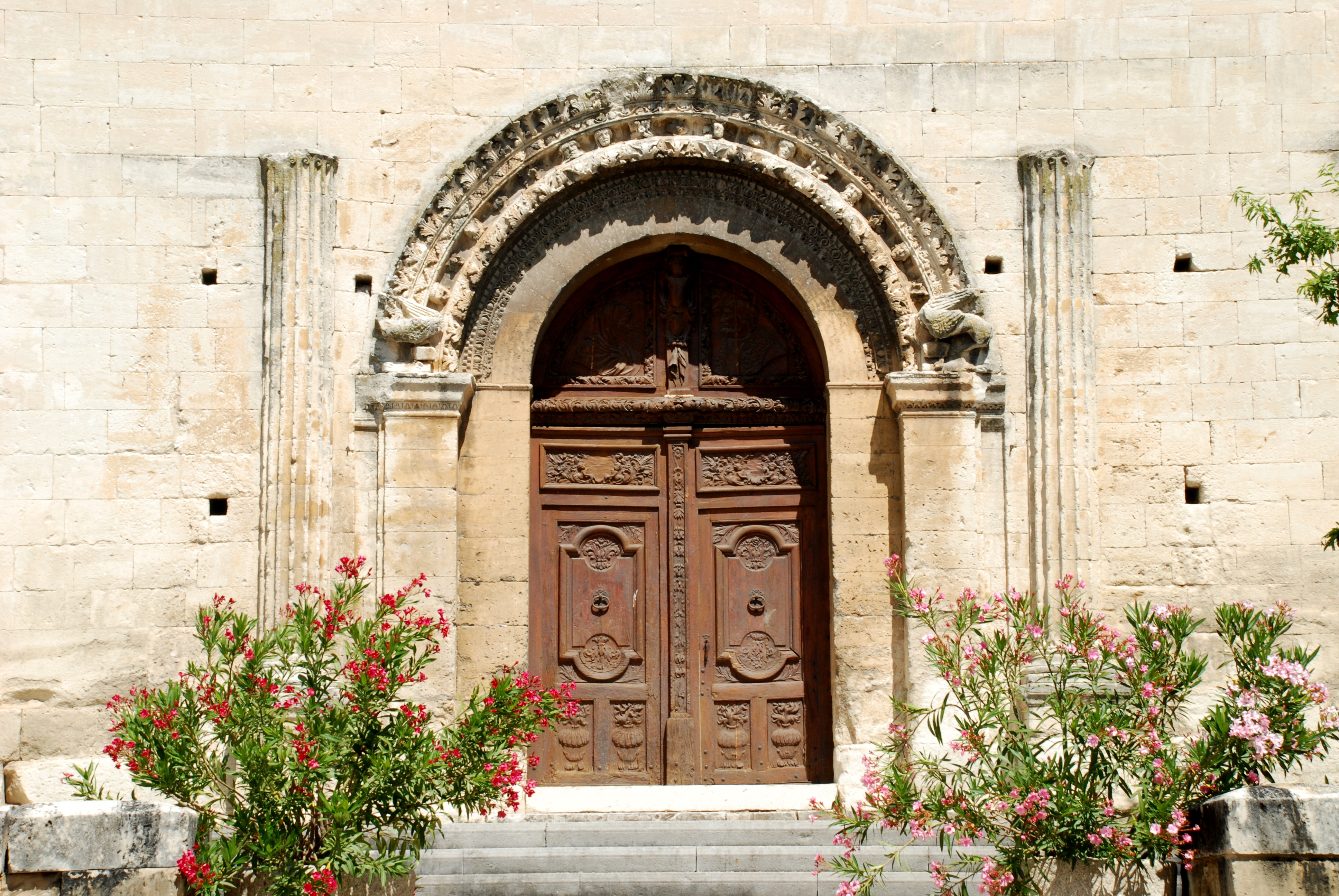 France - Drôme - Tricastin - Saint-Paul- Trois-Châteaux - église : portail à l'antique